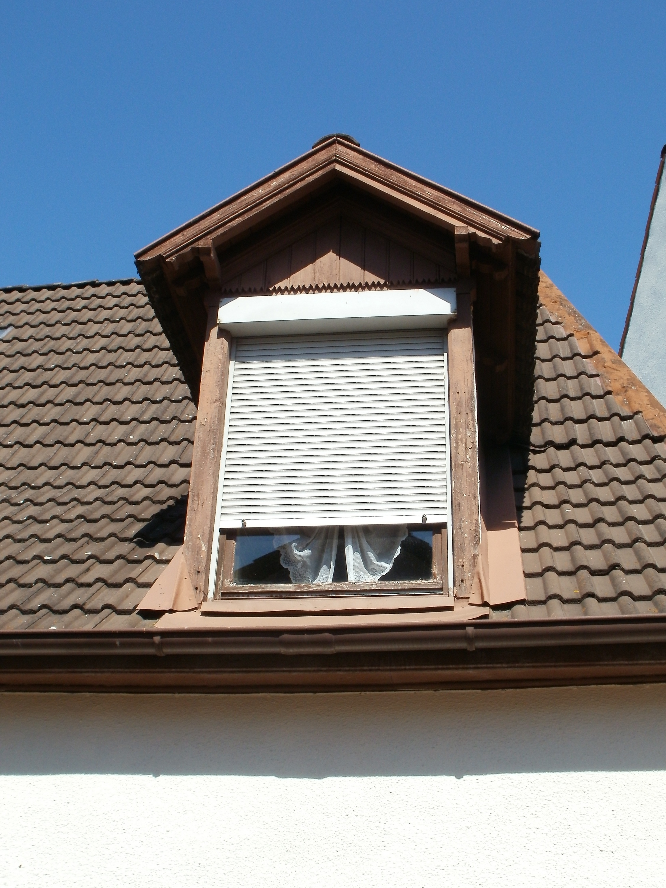 Dachgaube / Giebelgaube mit Jalousie in der Ottostraße (Hockenheim)